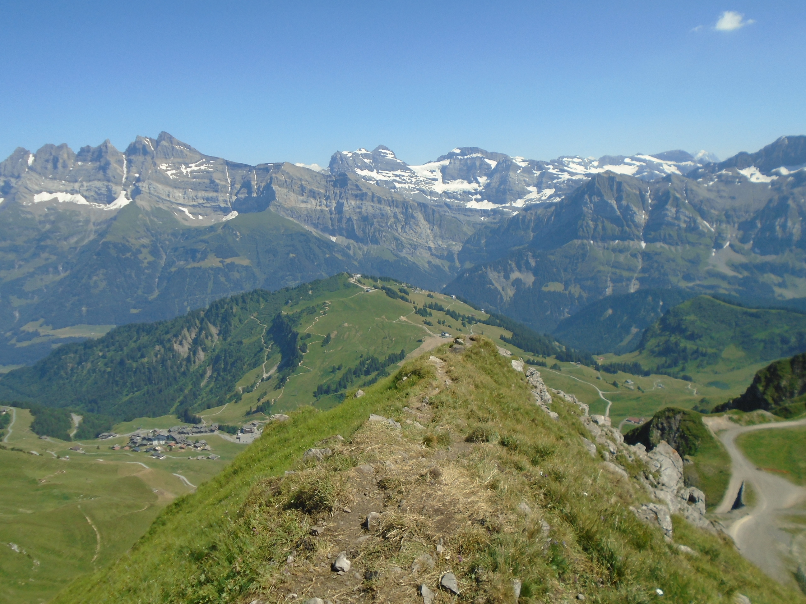 Mont Ruan z Pointe des Mossettes, Savojské Alpy